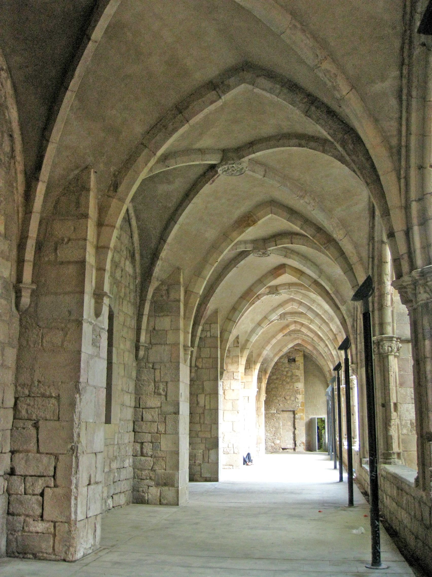 Antic Hospital de la Santa Creu, vast edifici gòtic del segle XV, al Raval de Barcelona. Galeria del claustre.